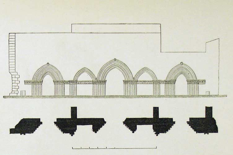 Plan et élévation du prieuré de Cayac (à Gradignan) dessinés par Lacourrière, gravure insérée dans le texte du compte rendu de l’année 1853 de la commission des Monuments historiques de la Gironde, A.D. 33, BIB 2 I/L 33, tome 2.